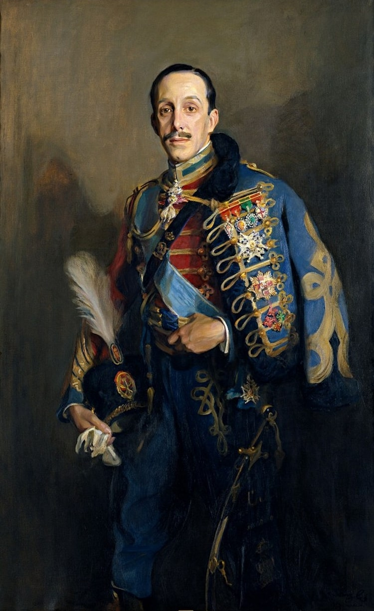 Retrato del rey Alfonso XIII de España, vestido con uniforme de húsar.